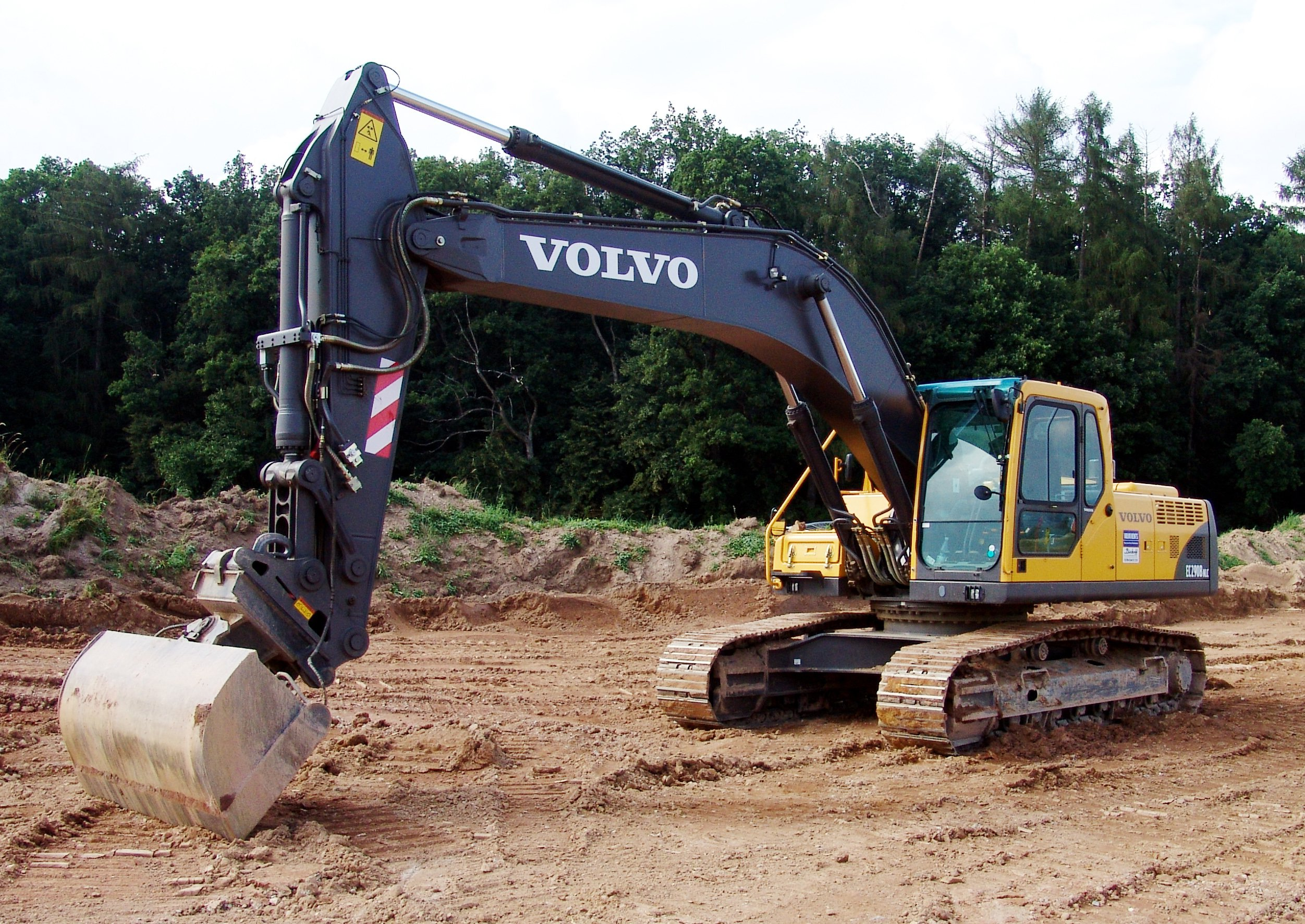 Volvo Kettenbagger EC290B